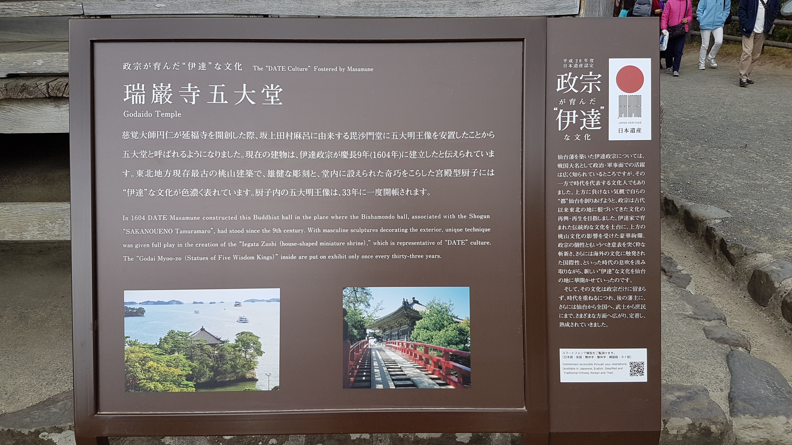 瑞巖寺五大堂